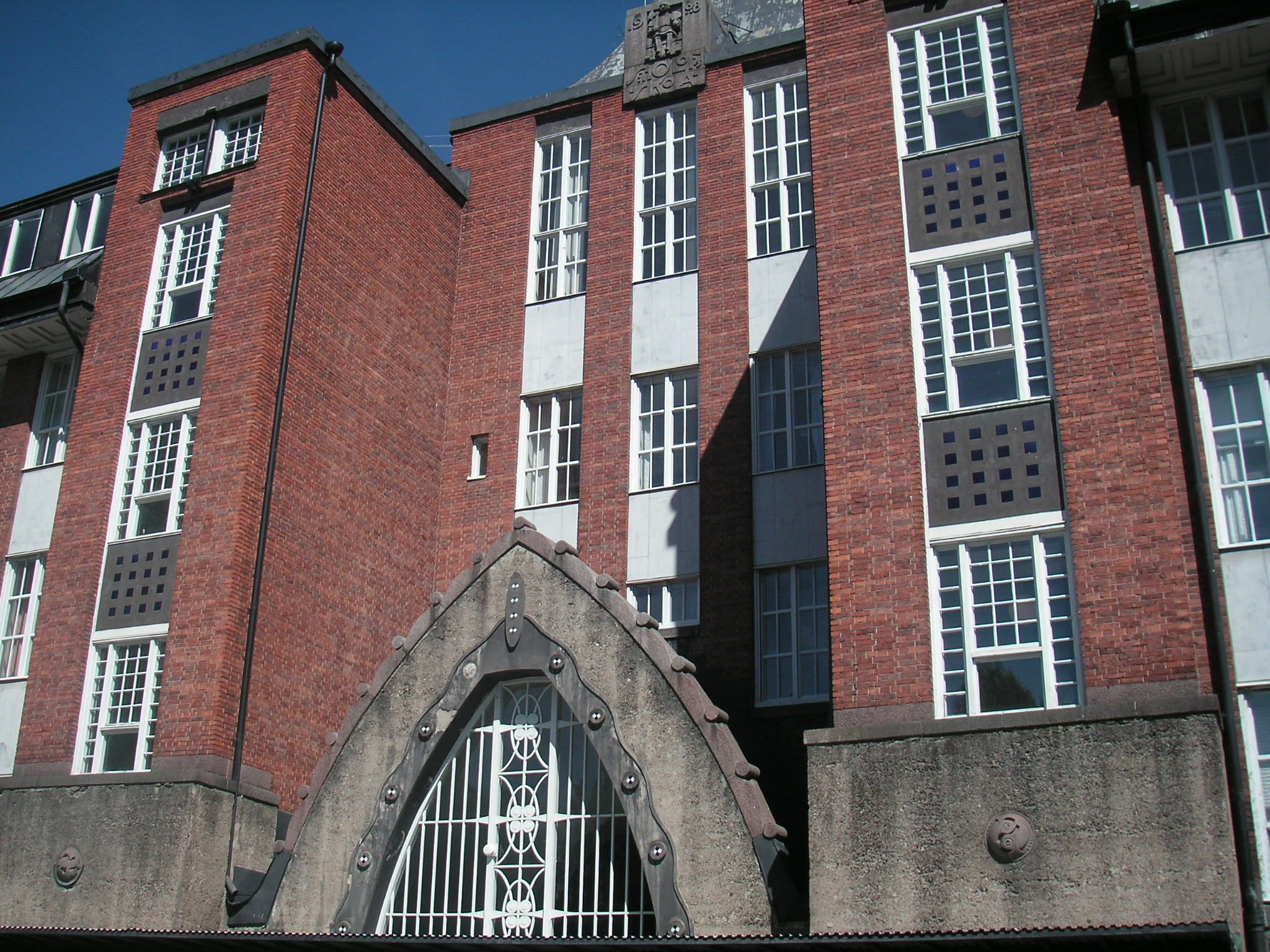 S:t Olofskolan, Norrköping, Sweden. Architect Carl Bergsten 1908.